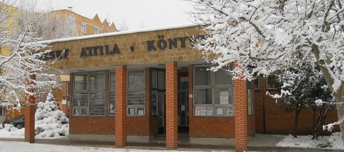 Makói József Attila Városi Könyvtár - télen